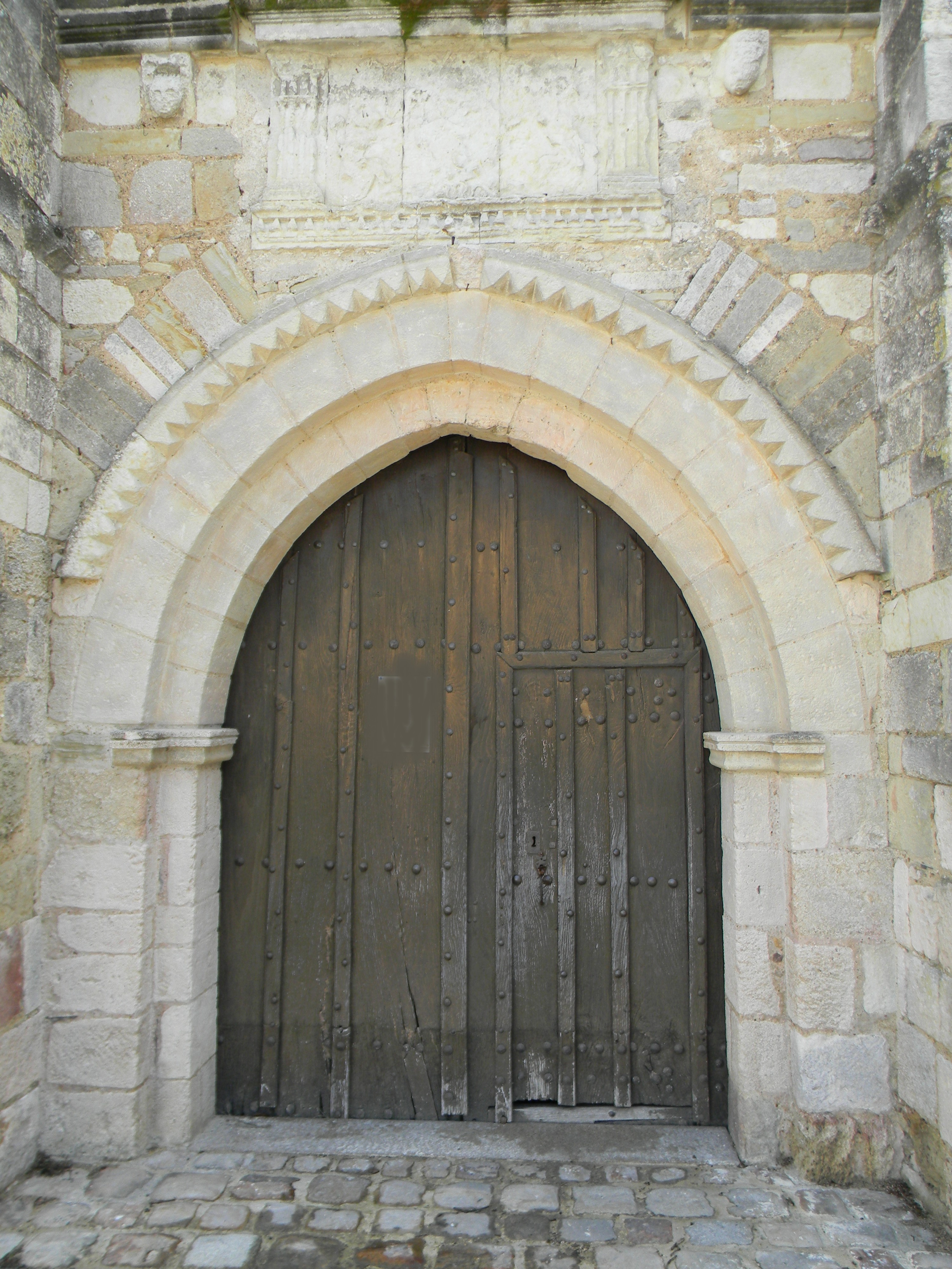 Portail de l'église Notre Dame de Brissarthe